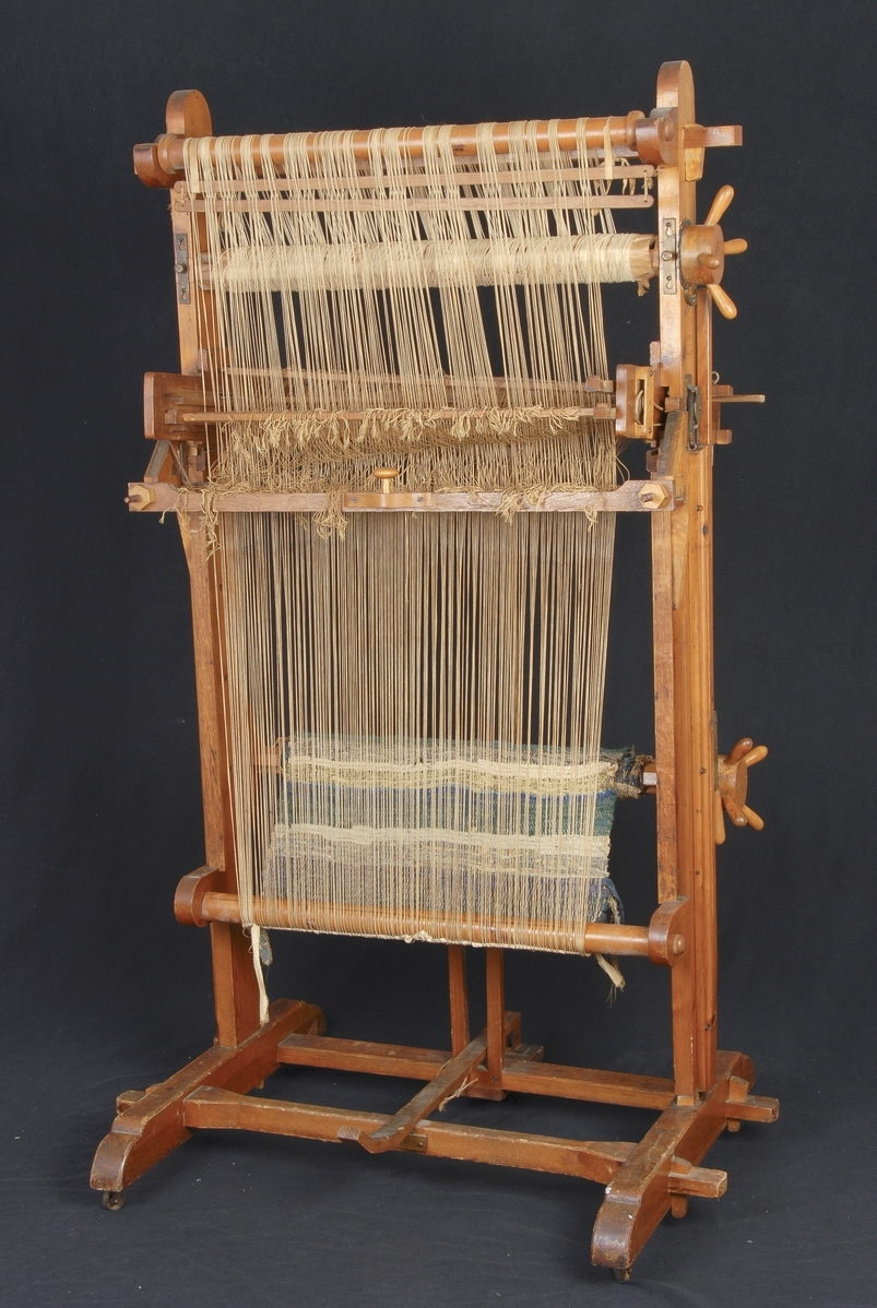 Vev med påbegynt vevnad, fillrye. Stempel : Ida Hellesen / Patent 5337 / Christiania